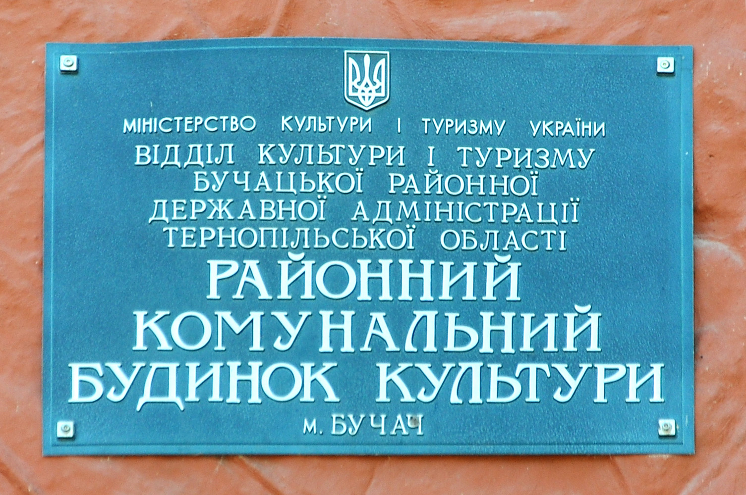 Бучацький районний комунальний будинок культури. Вивіска.